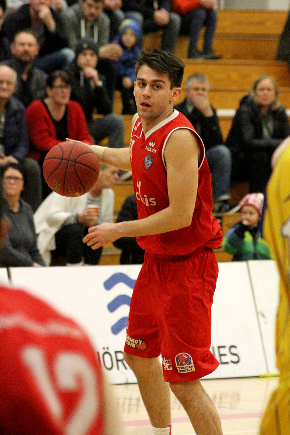 karfan.is/read/2015/01/08/jon-axel-leiddi-grindavik-til-s...